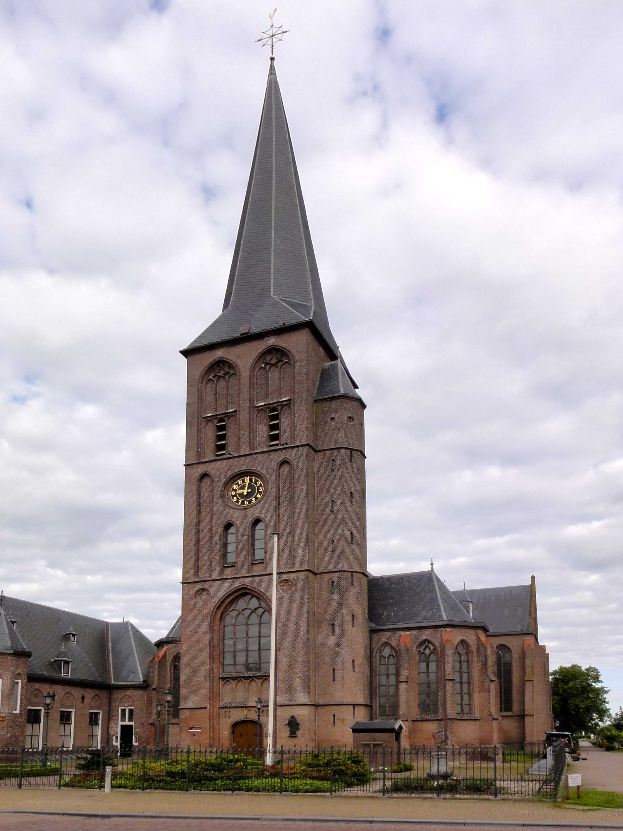 Sint-Werenfriduskerk Noard 175 Workum